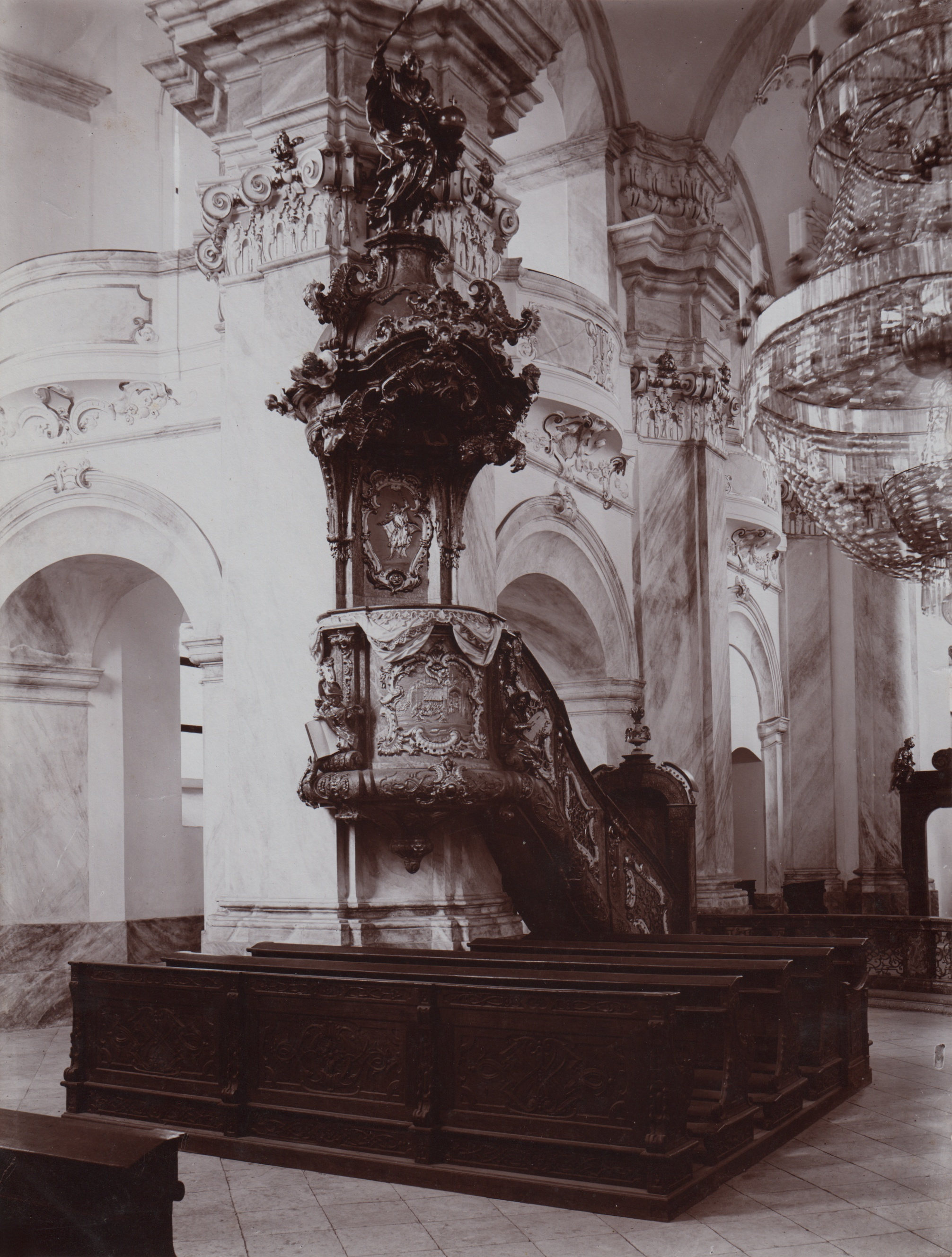 Kostel Nanebevzetí Panny Marie, Zlonice, kazatelna.